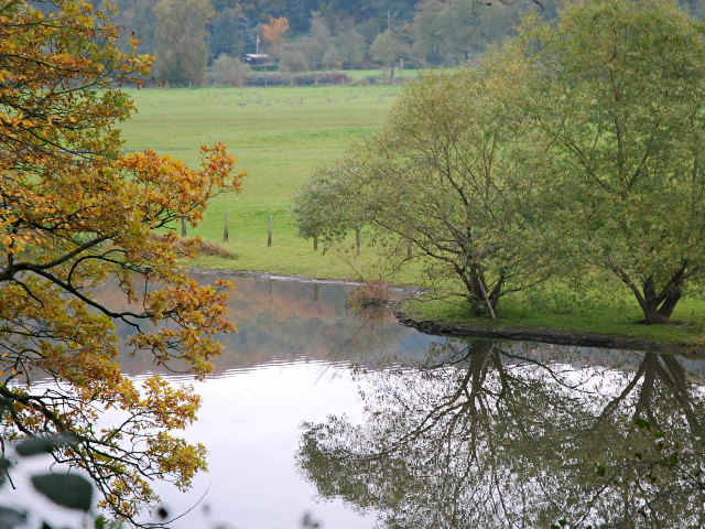 Naturschutzgebiet EN-006 „Ruhraue Witten-Gedern“, Blick vom Ruhrtalradweg über einen Teil des Spieks (Ruhr-Altarm) ins Gebiet, Witten-Bommern